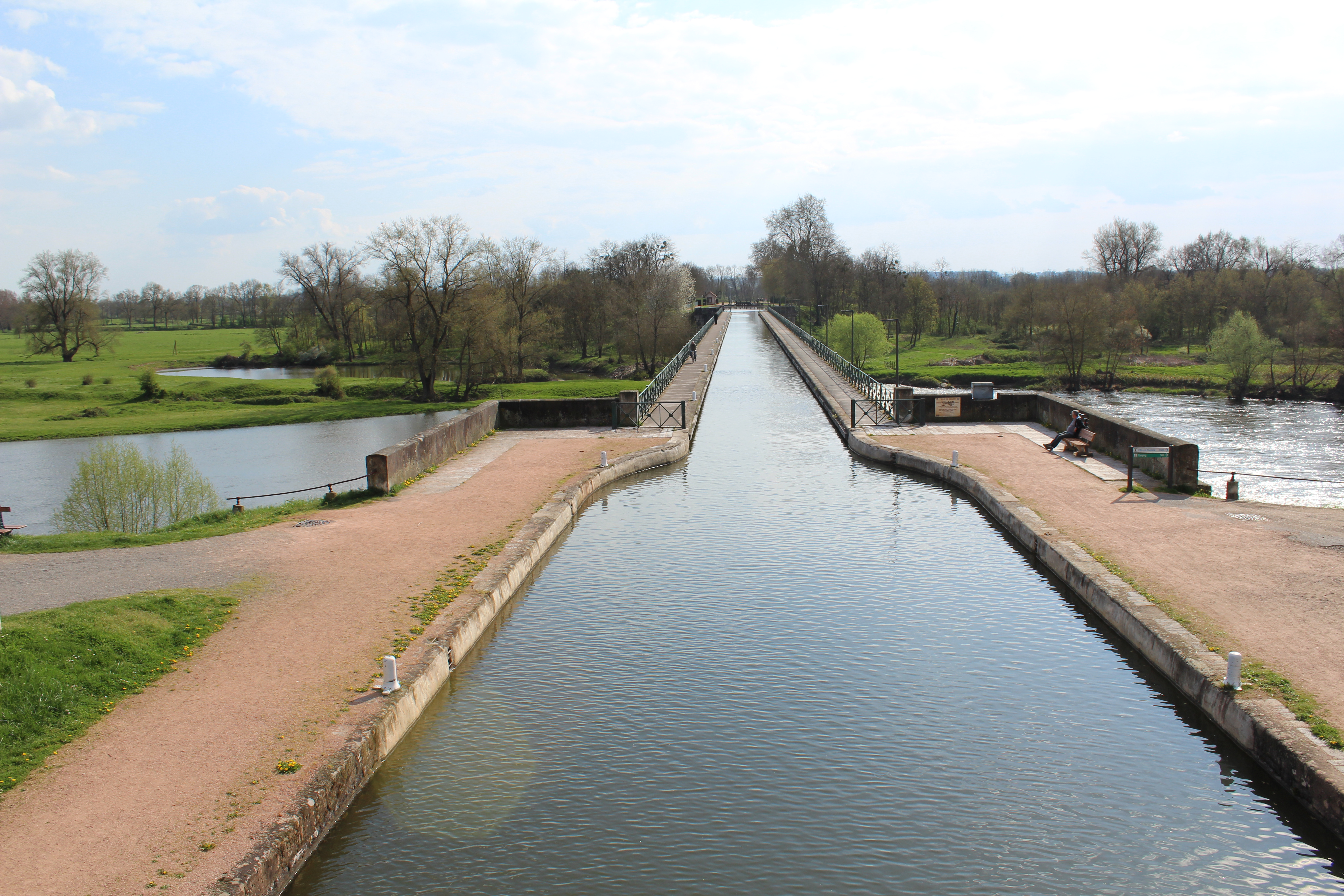 Pont-canal de Digoin.